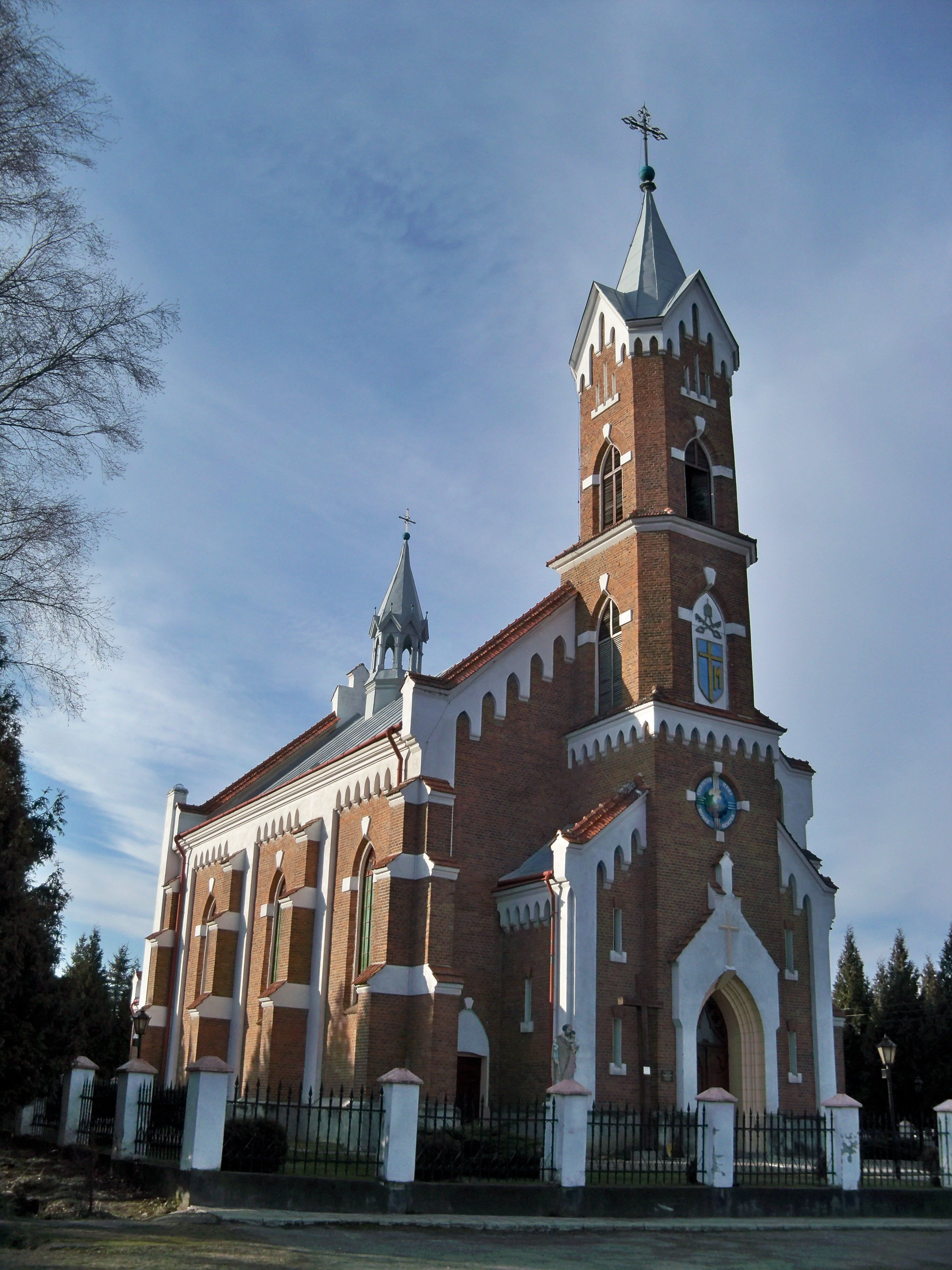 Костел Св. Миколая (дер.), с. Пнікут.